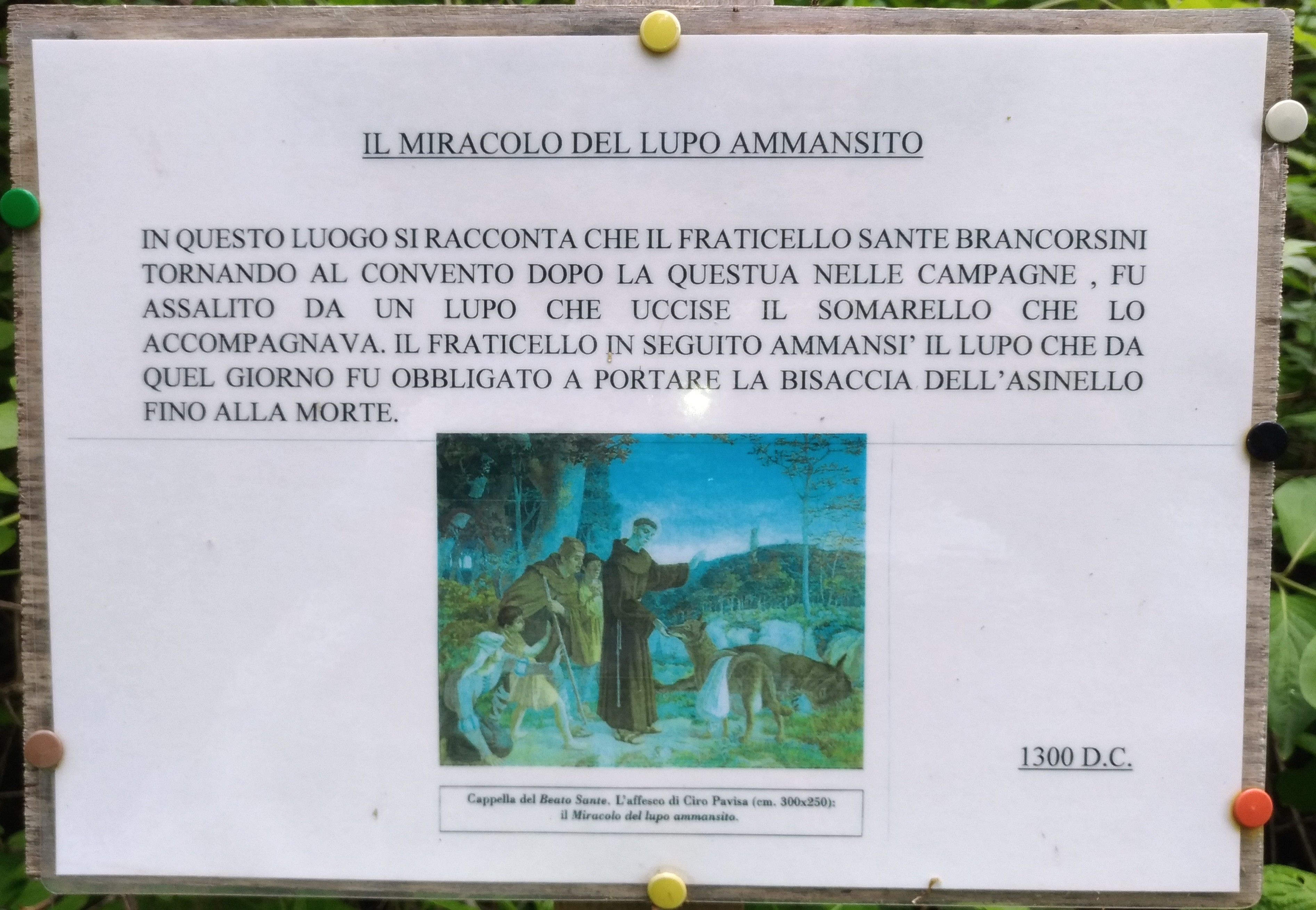 Immagine presente nel bosco di Beato Sante